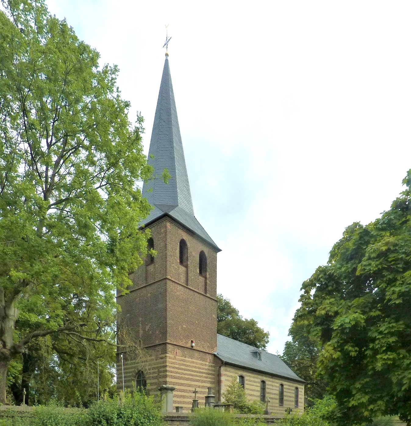 St. Medardus (Auenheim, Bergheim)